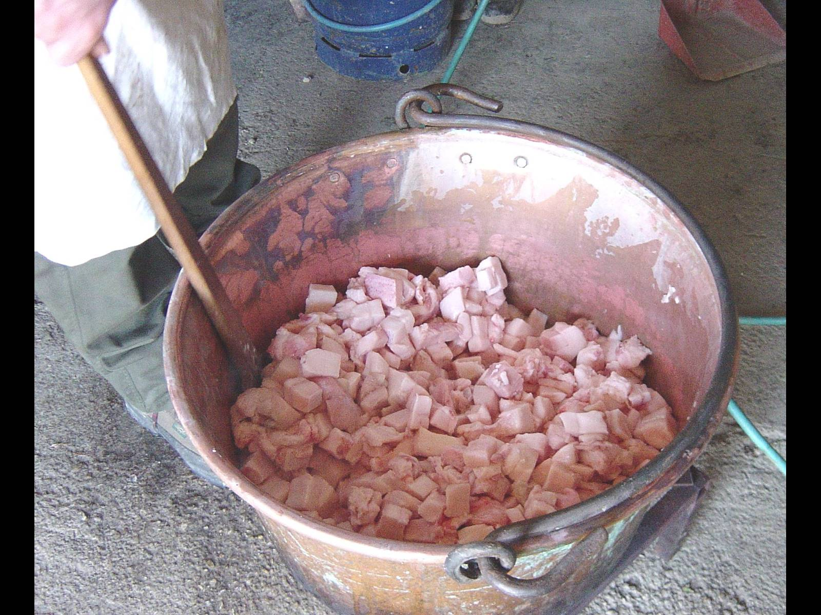 Zsírszalonna kisütése bográcsbn